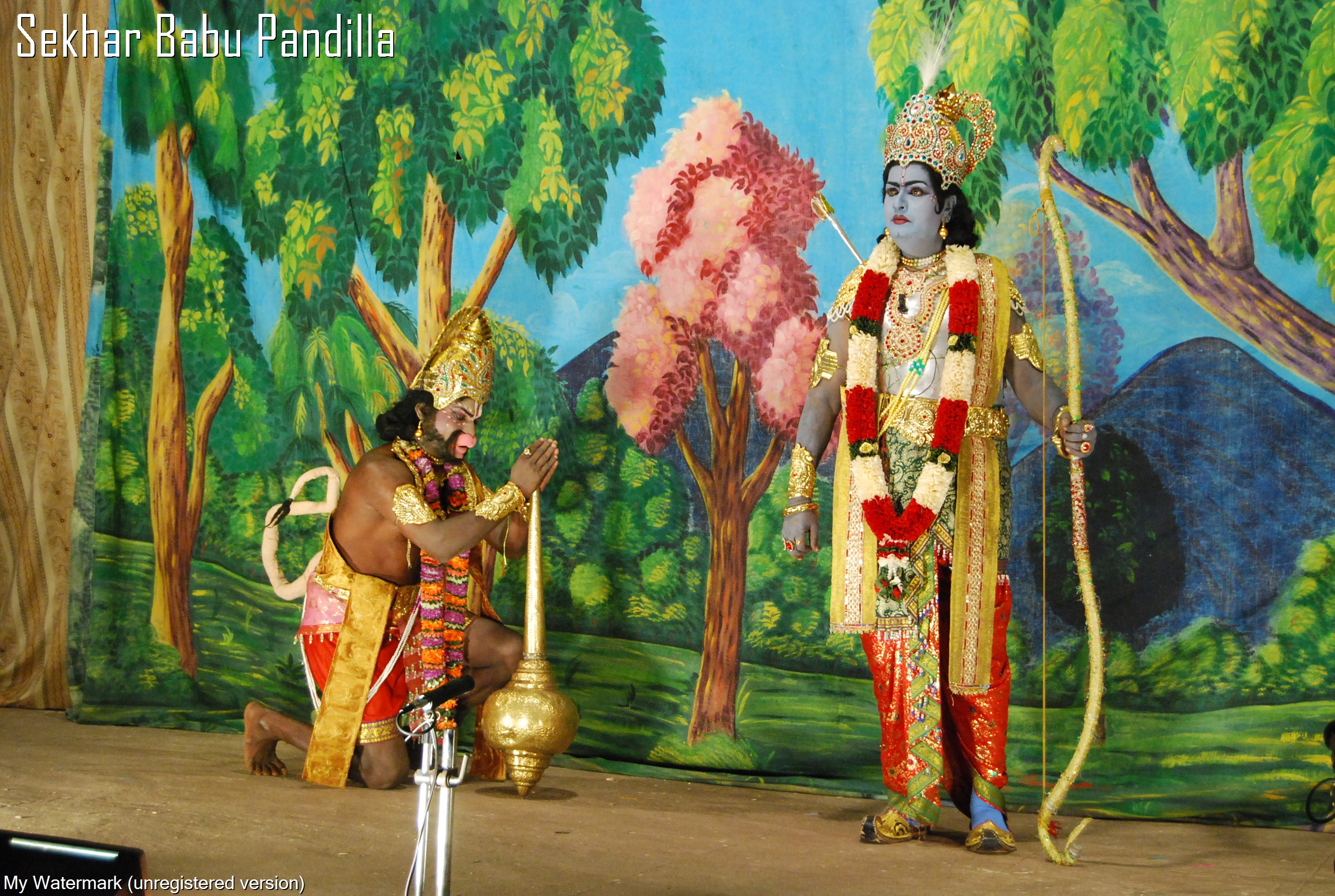 శ్రీ రామాంజనేయ యుద్ధం నాటకంలో శ్రీ రాముడు పందిళ్ళ శేఖర్ బాబు,ఆంజనేయుడు చిలువేరు శాంతయ్య.